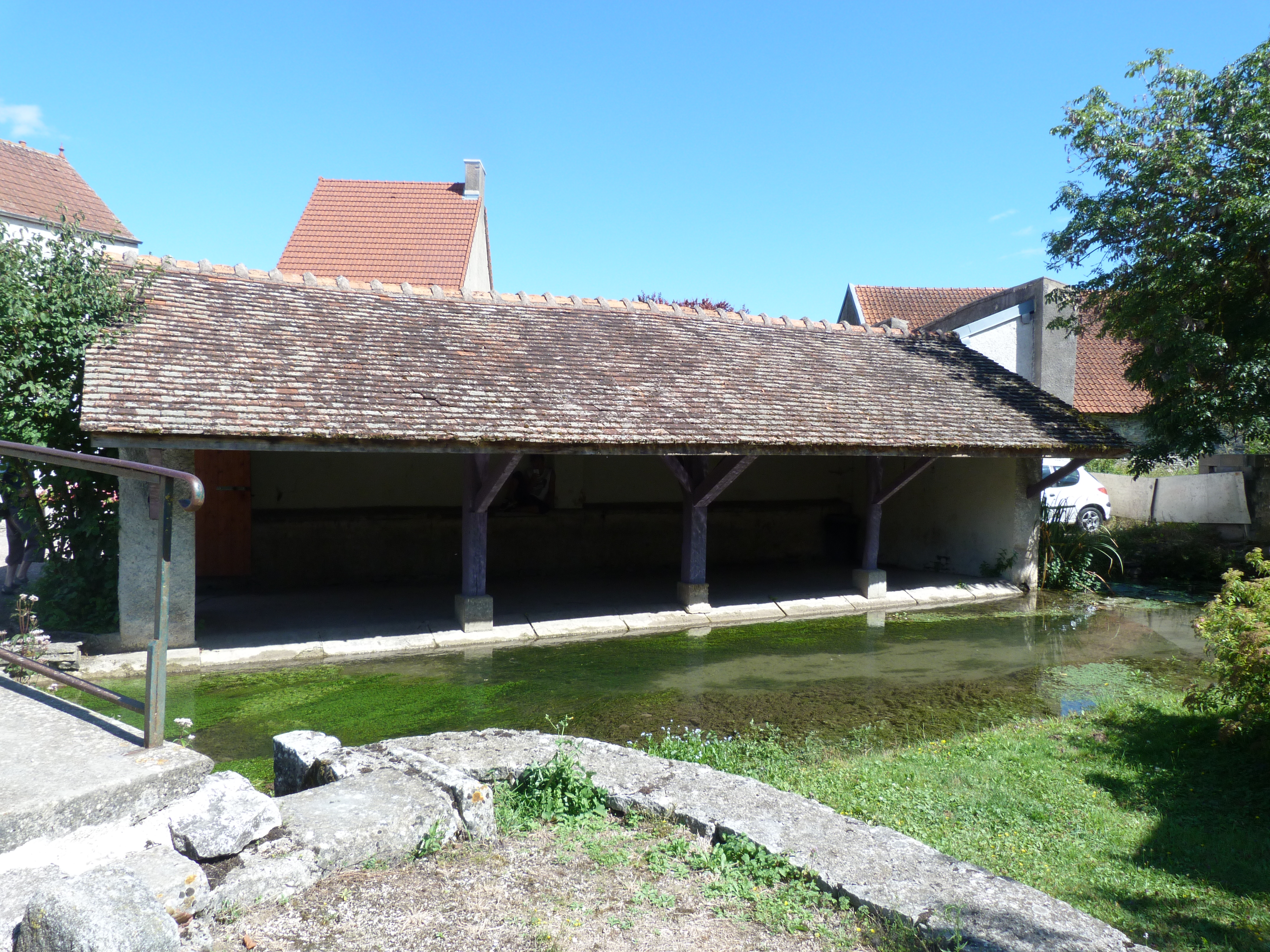 Lavejo de Échevannes